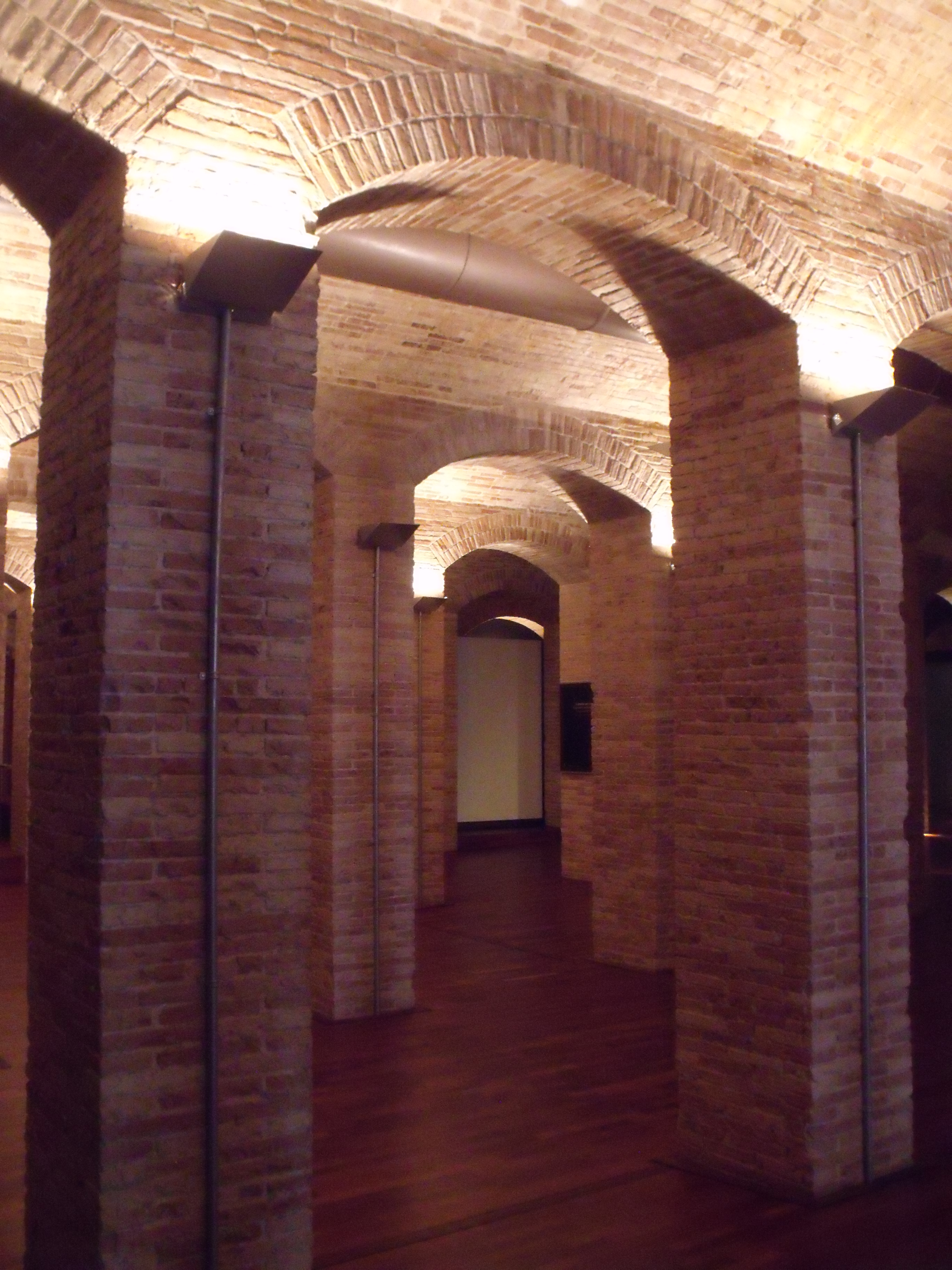 Interior del depósito de agua usado actualmente como Museo de Historia Valencia